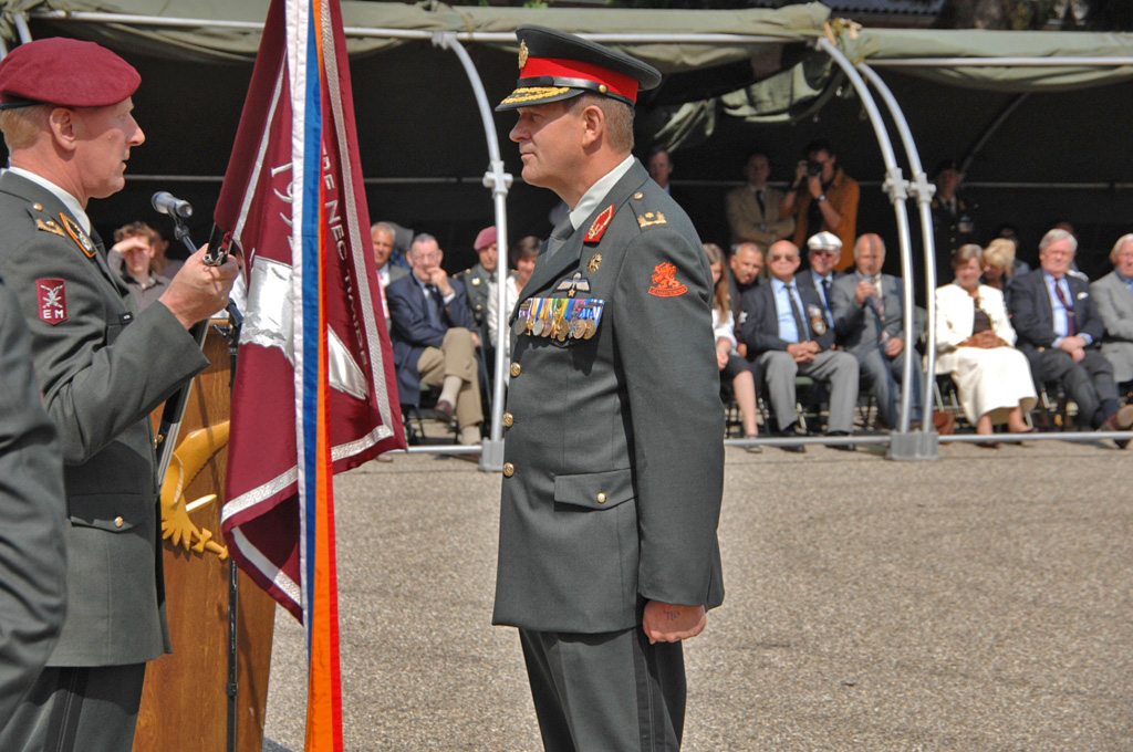 Commando overdracht 11 Luchtmobiele Brigade "7 december" (AASLT). Links: Brigadegeneraal Marc van Uhm, rechts: Brigadegeneraal Otto van Wiggen